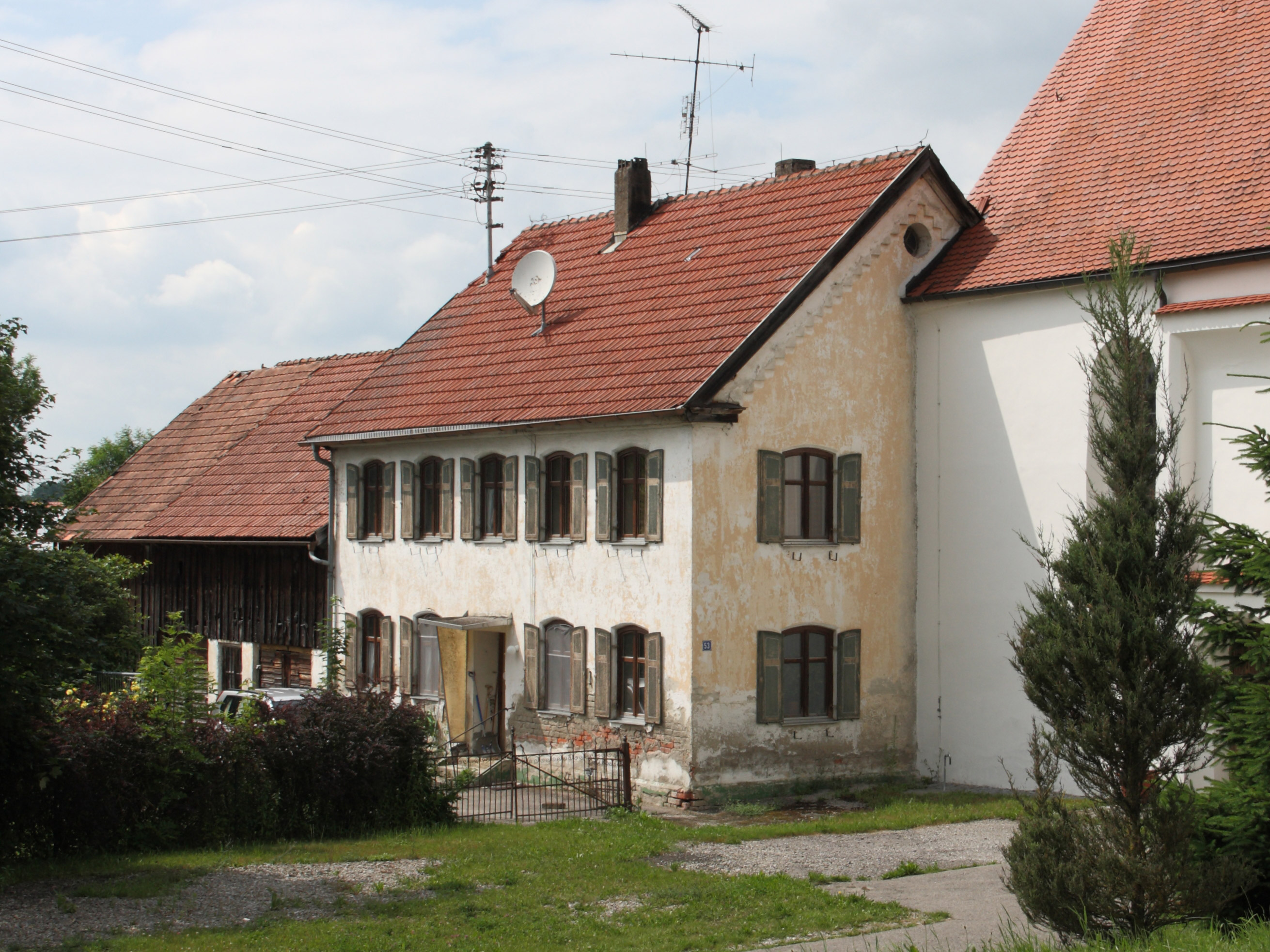 Ehemaliges Benefiziatenhaus mit Wirtschaftsteil an der Kirche Sankt Leonhard